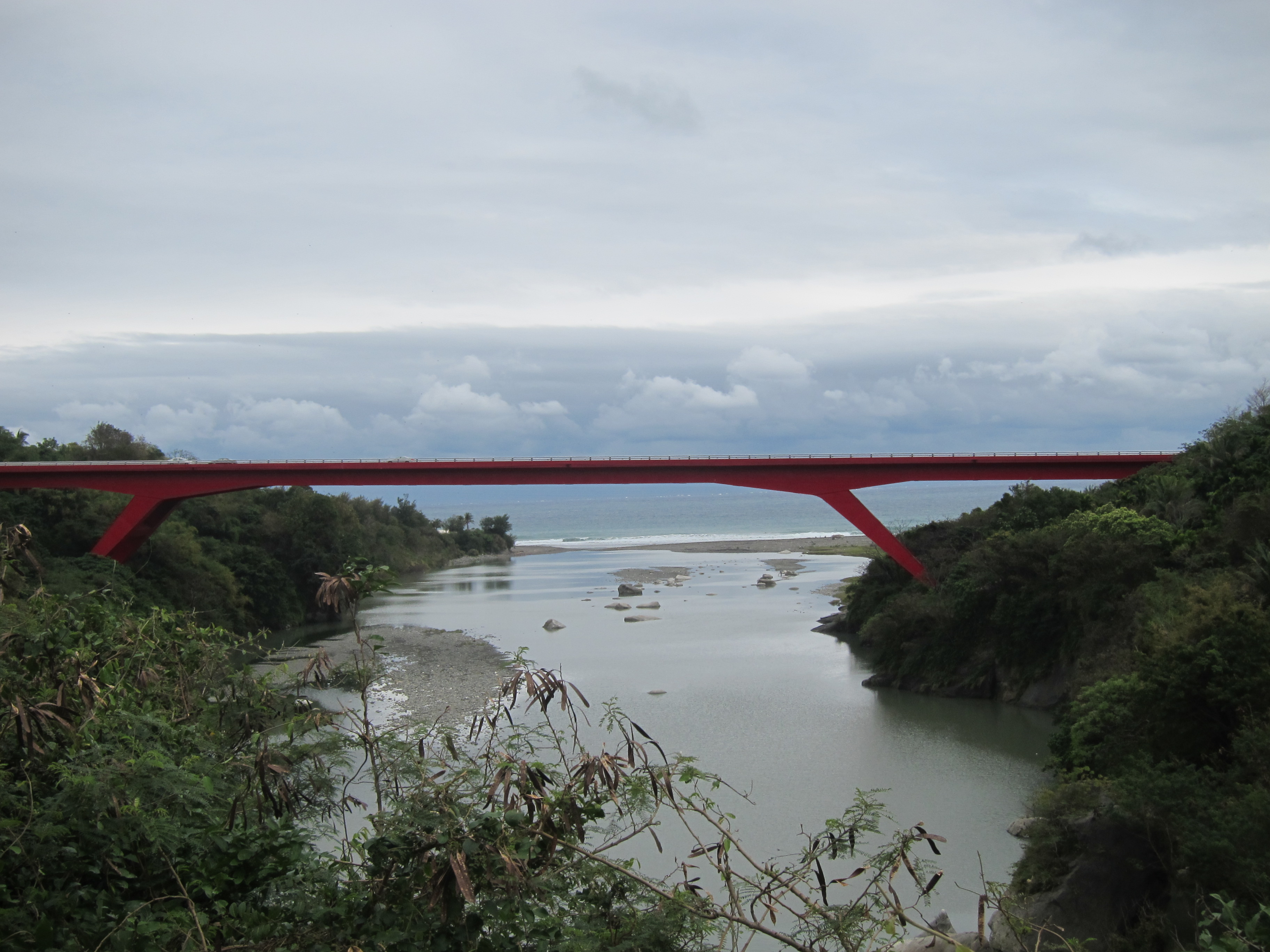 中文（台灣）: 台東東河鄉的馬武窟溪。